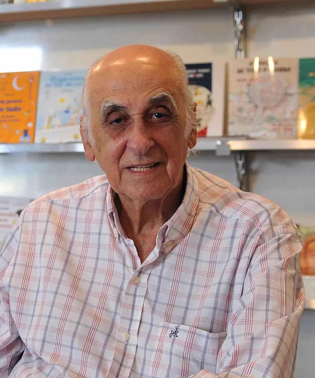 Brasília - Jornalista e escritor Zuenir Ventura promoveu palestra na 1ª Bienal Brasil do Livro e da Leitura. Ele abordou o engajamento político da juventude brasileira hoje e em 1968